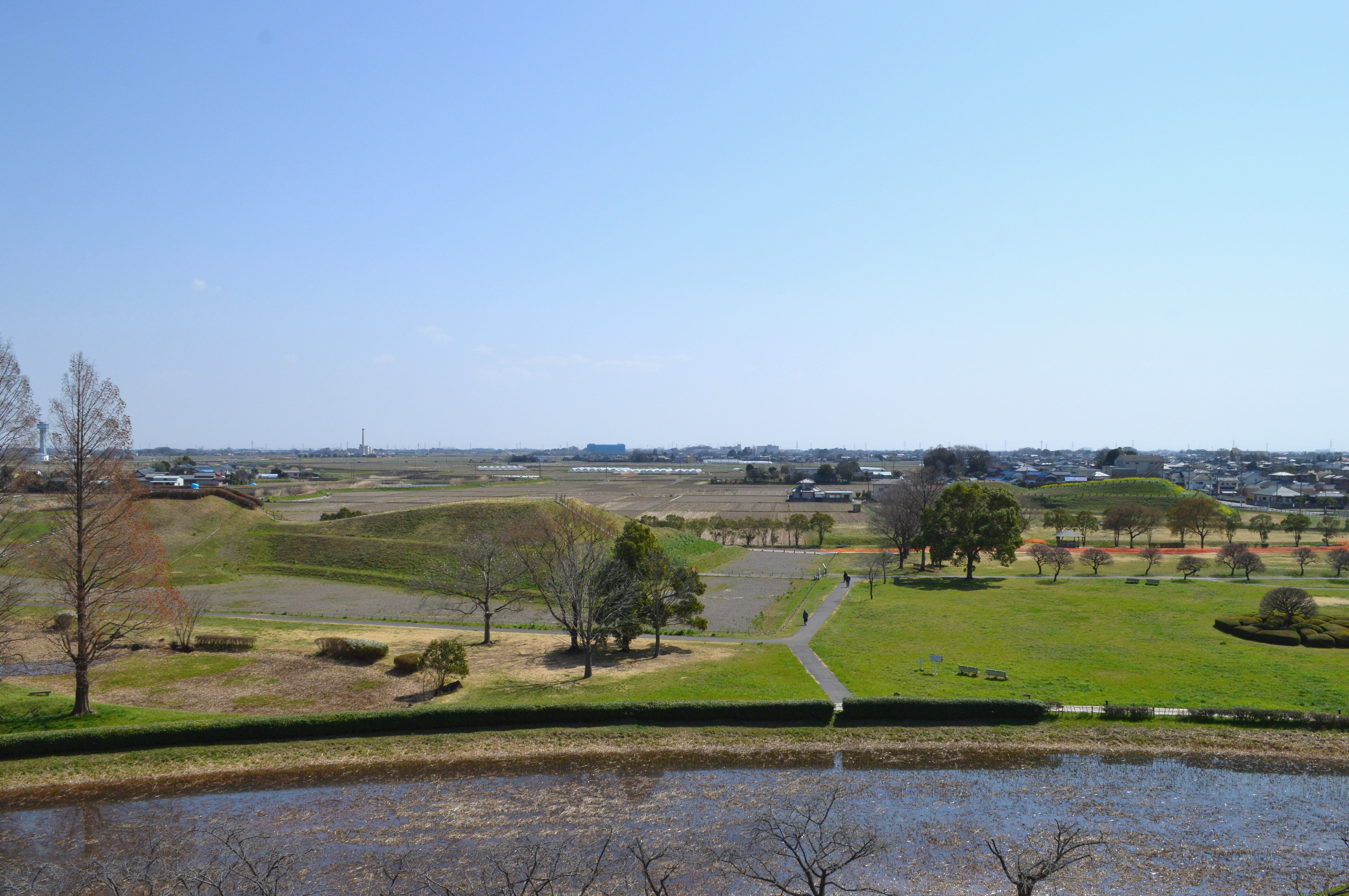 稲荷山古墳と将軍山古墳 (行田市)